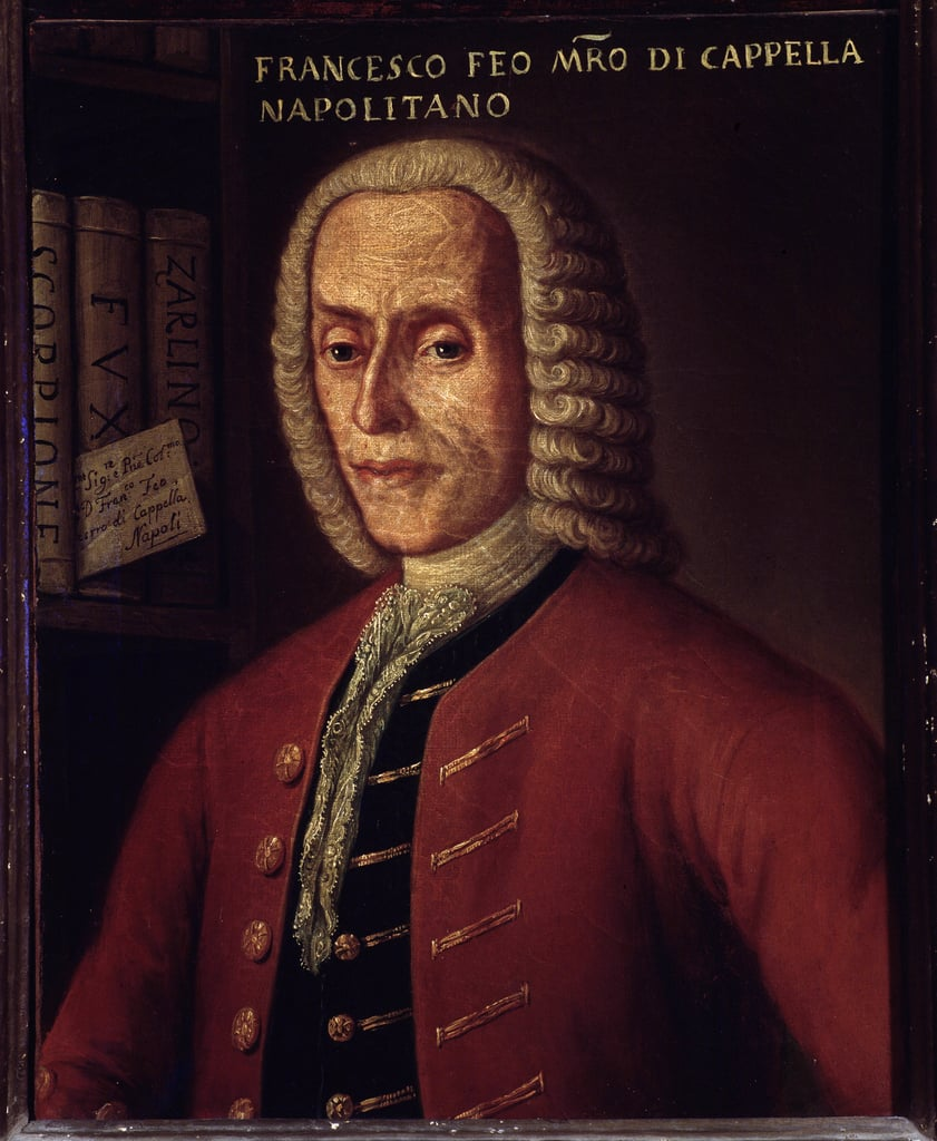 Francesco Feo (1691-1761), italienischer Opernkomponist